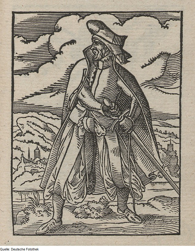 Original image description from the Deutsche Fotothek Ständebuch & Amt & Militär & Wachtmeister